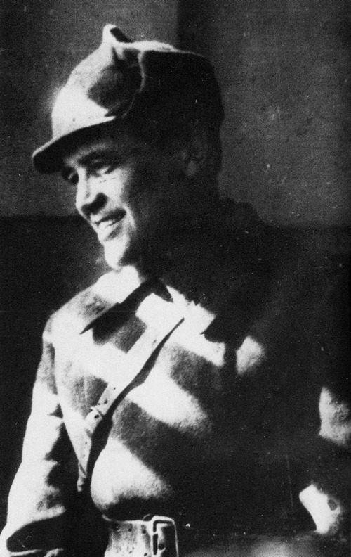 Эйольф Георгиевич Игнеус-Матсон